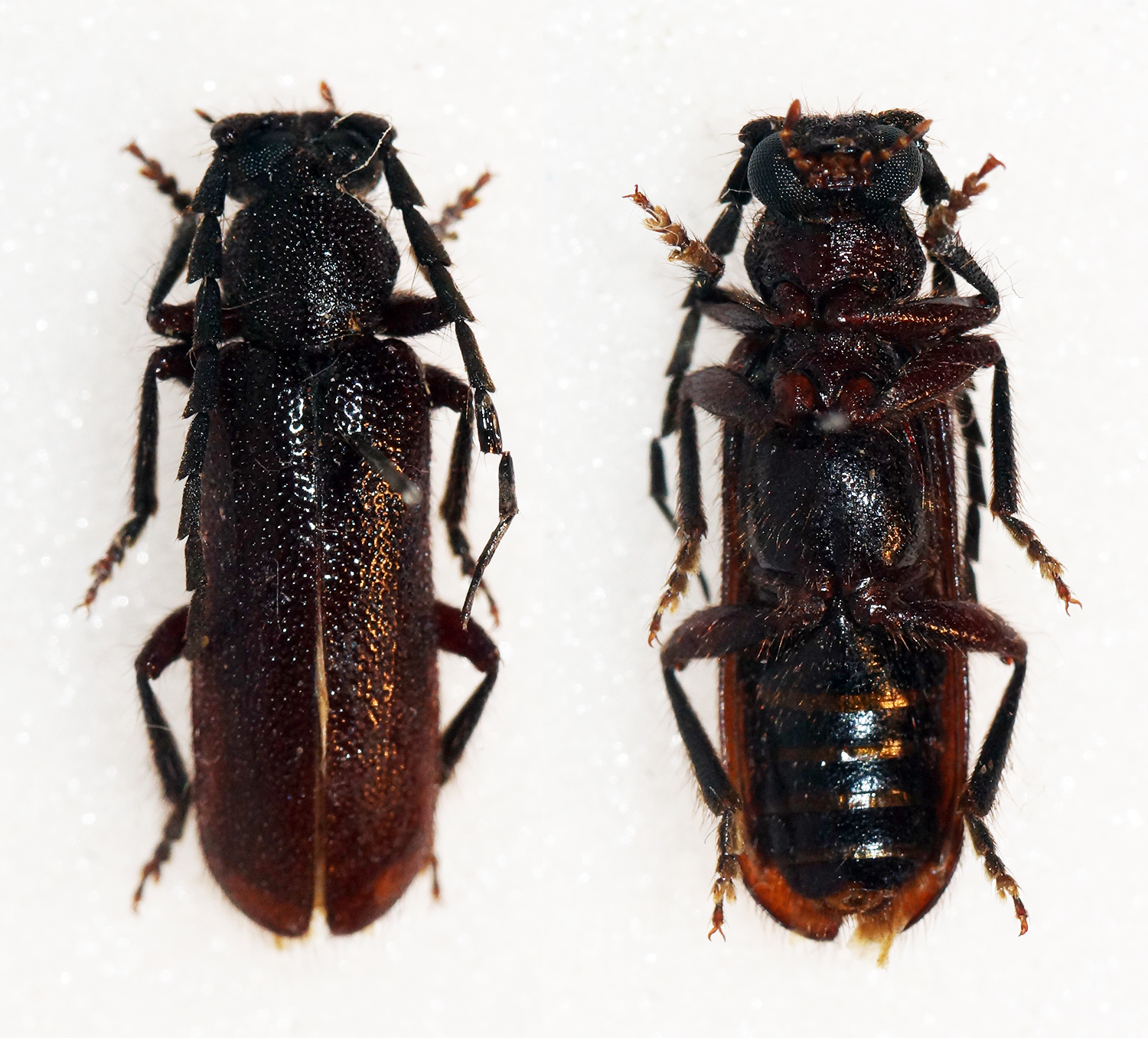 Adlbauer,1998 Sex: ? Data: 04-12-05 - 15KM SE of Manje - Tete prov - Mozambique Size: 13mm